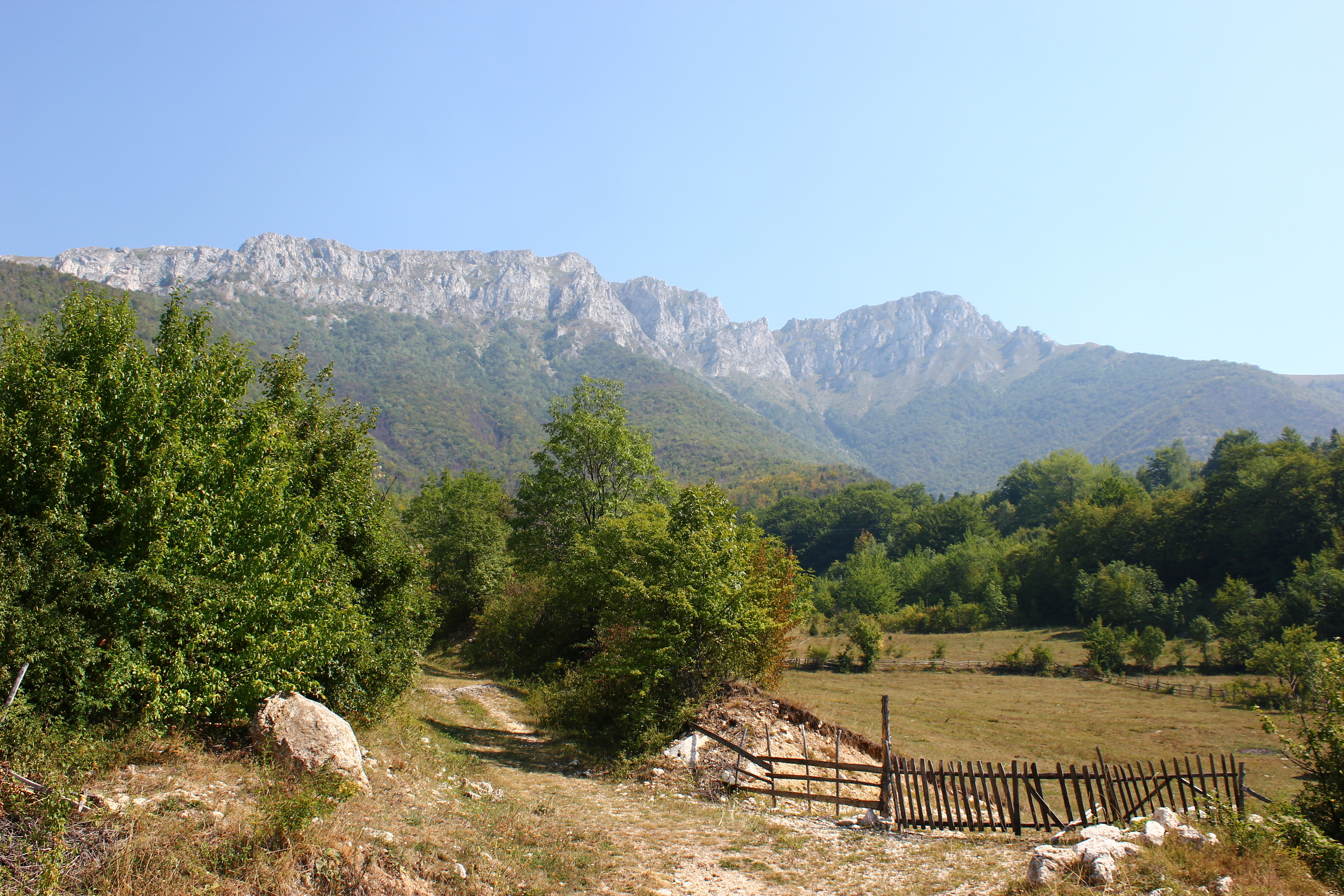 Südwand des Vlašić bei Turbe (Bosnien und Herzegowina), gesehen vom Dorf Paklarevo.